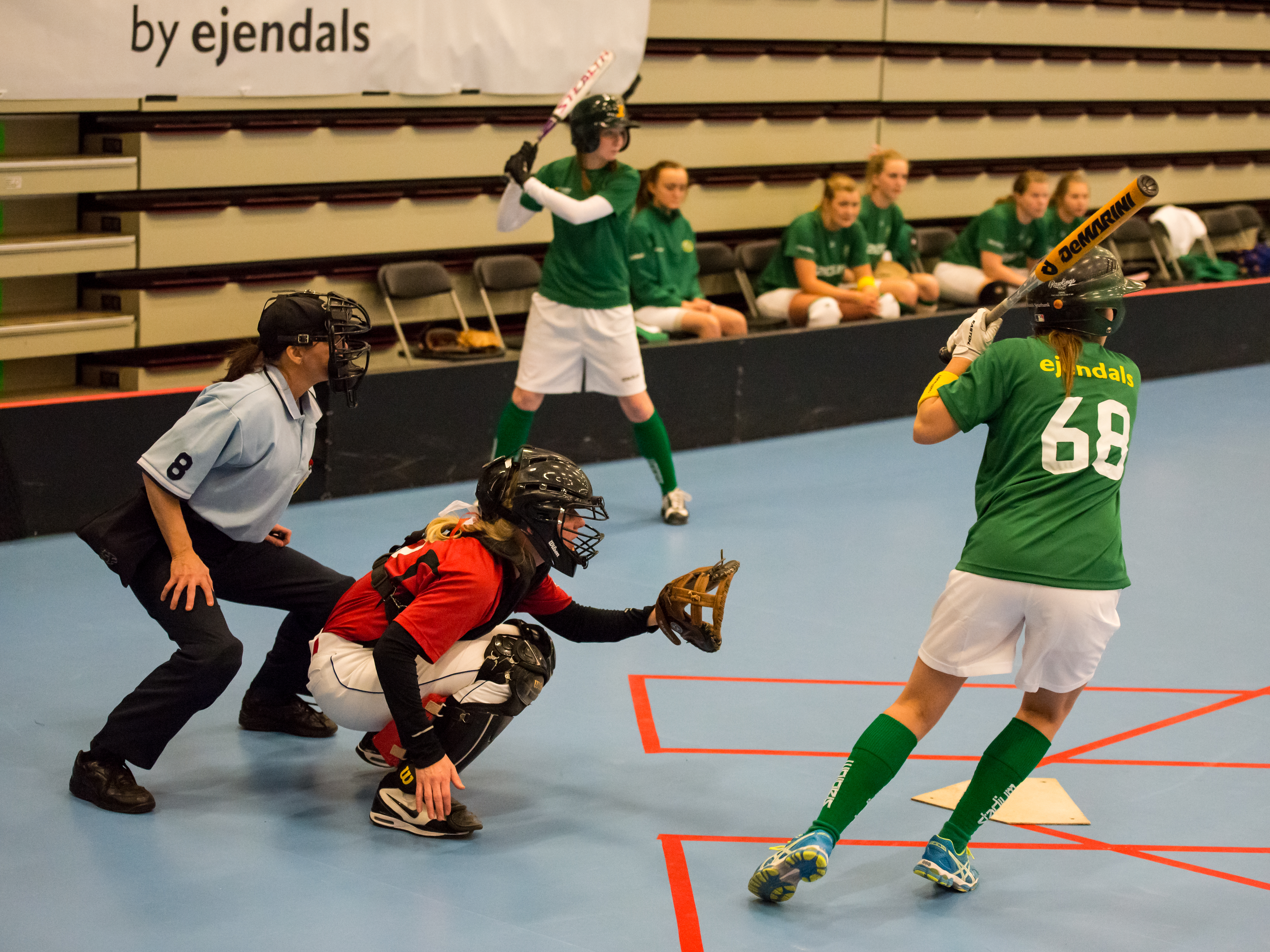 SM i softball, gruppspelsmatch mellan Leksand (i grönt) och Enköping (i rött) i Falu Kuriren Arena, Falun, Sverige.